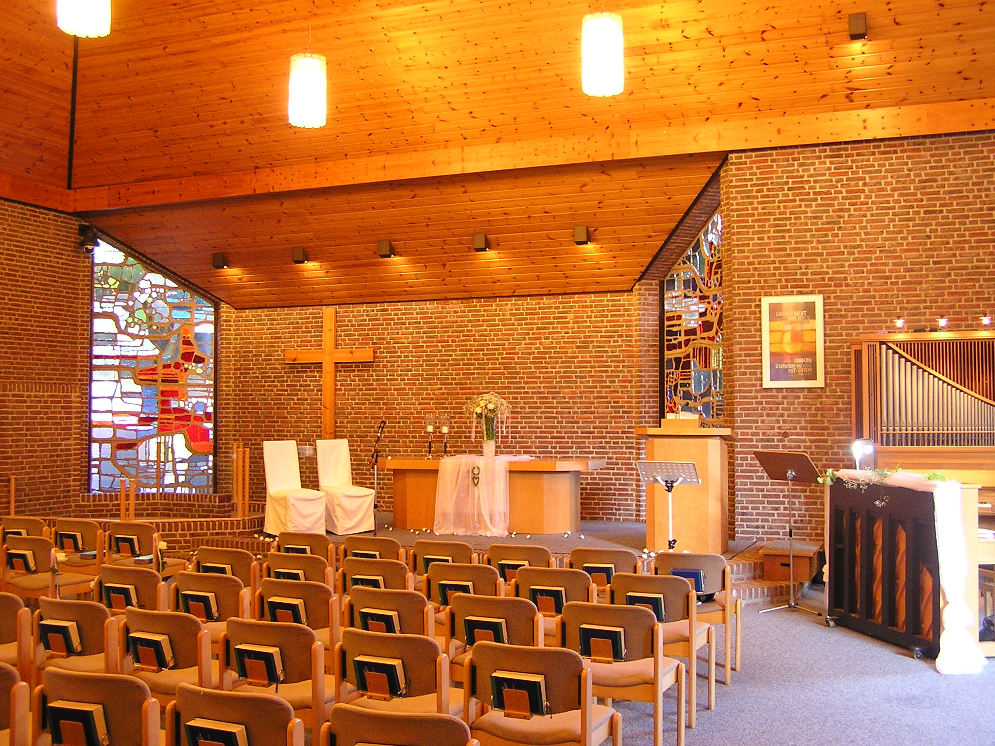 Innenraum Baptistenkirche in Leer (Ostfriesland)